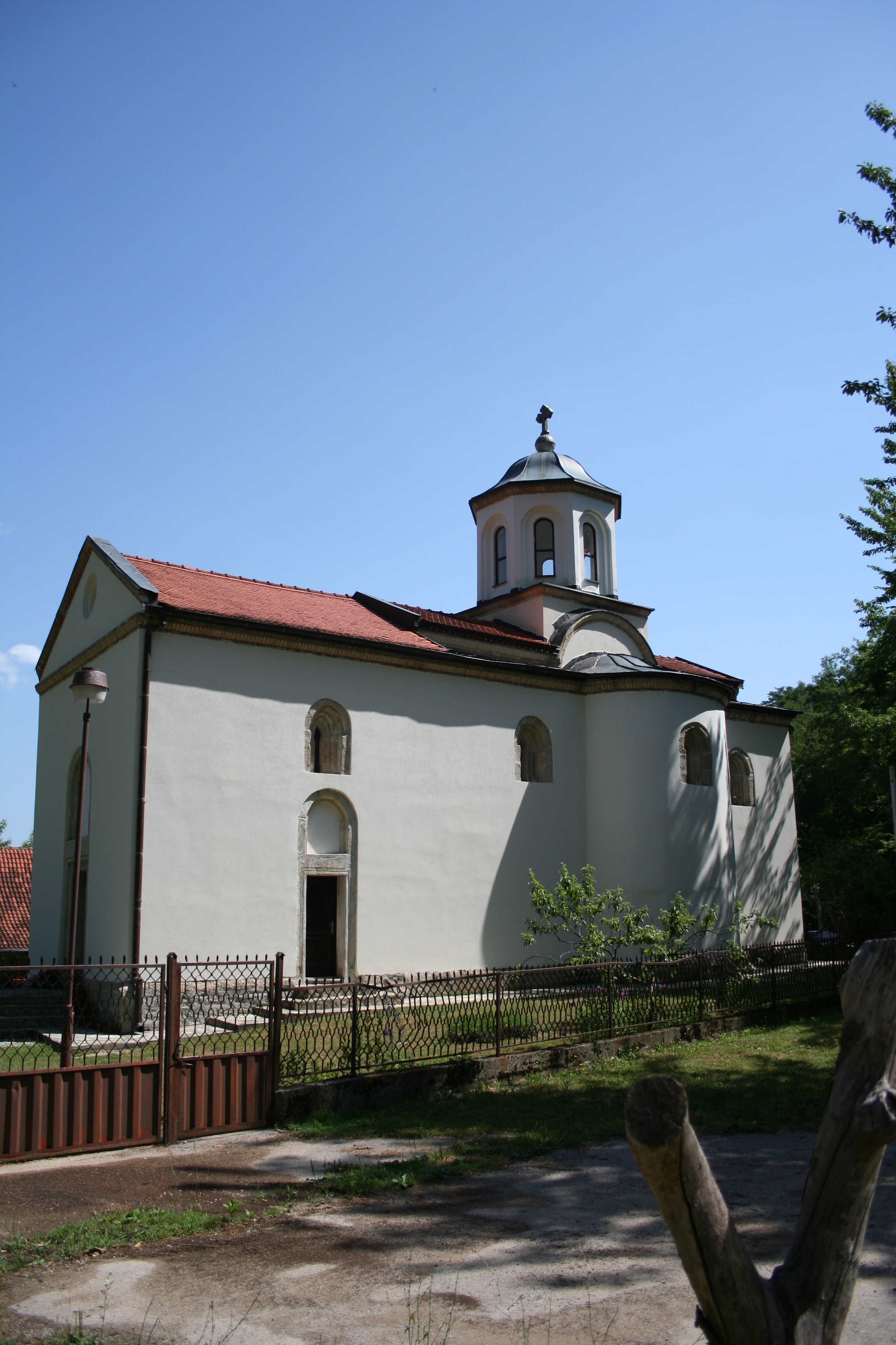 Crkva Svetog proroka Ilije, selo Ba